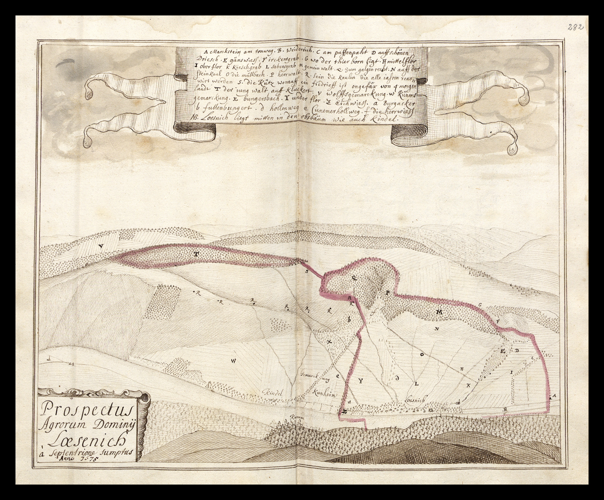 Skizzierung der Herrschaft Lösnich im Jahre 1675 im Lagerbuch Band III DK 5196 der Reichsgrafen von Kesselstatt